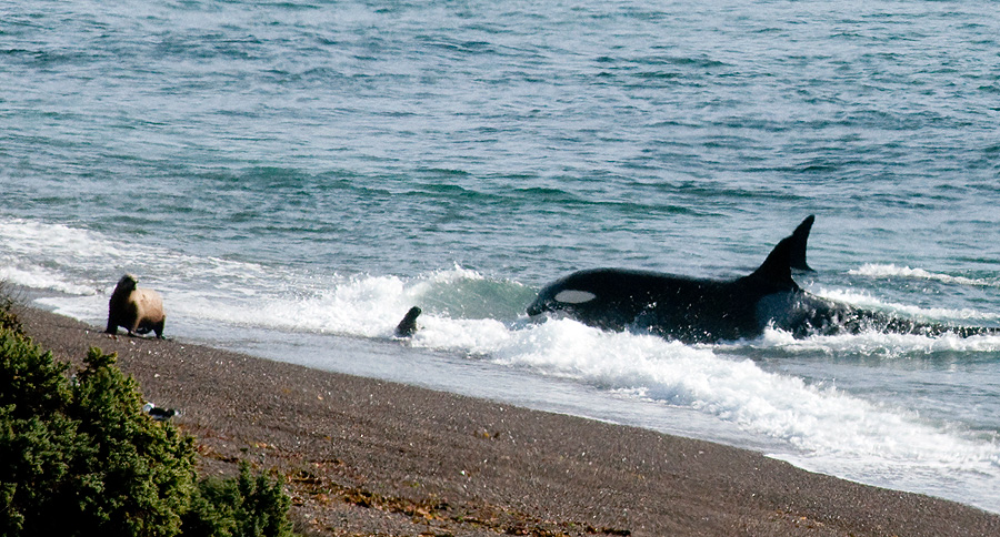 Orcas in Punta Norte Valdes Peninsula